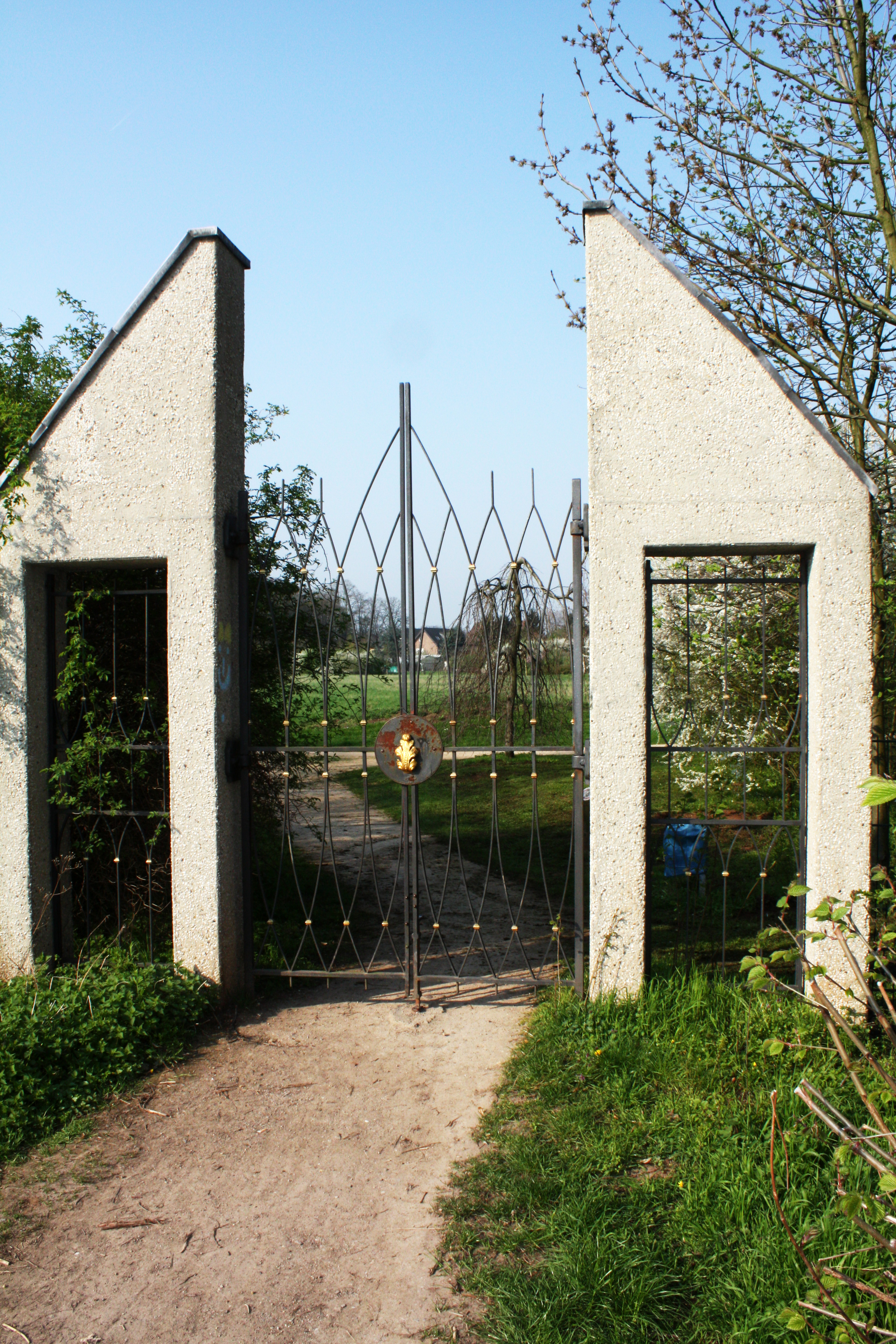 Parkanlagen Schloss Lechenich, nordöstlicher Eingang zur neuen Parkerweiterung